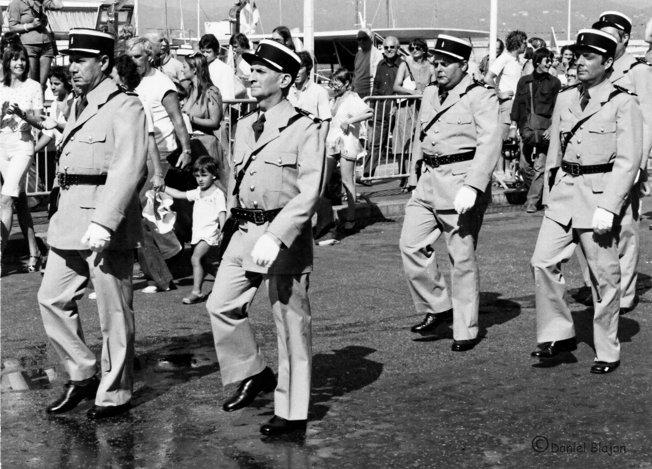 Tournage du défilé final du film Le Gendarme et les Extra-terrestres en 1978, à Saint Tropez, avec les acteurs Michel Galabru, Louis de Funès, Maurice Risch, Michel Modo et Guy Grosso.